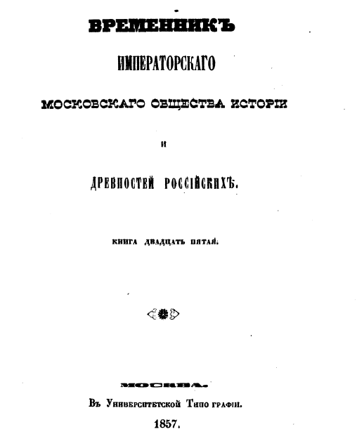 Временник Императорскаго, Московскаго Общества Истории и Древностей Российских. книга 25-я, 1857 год